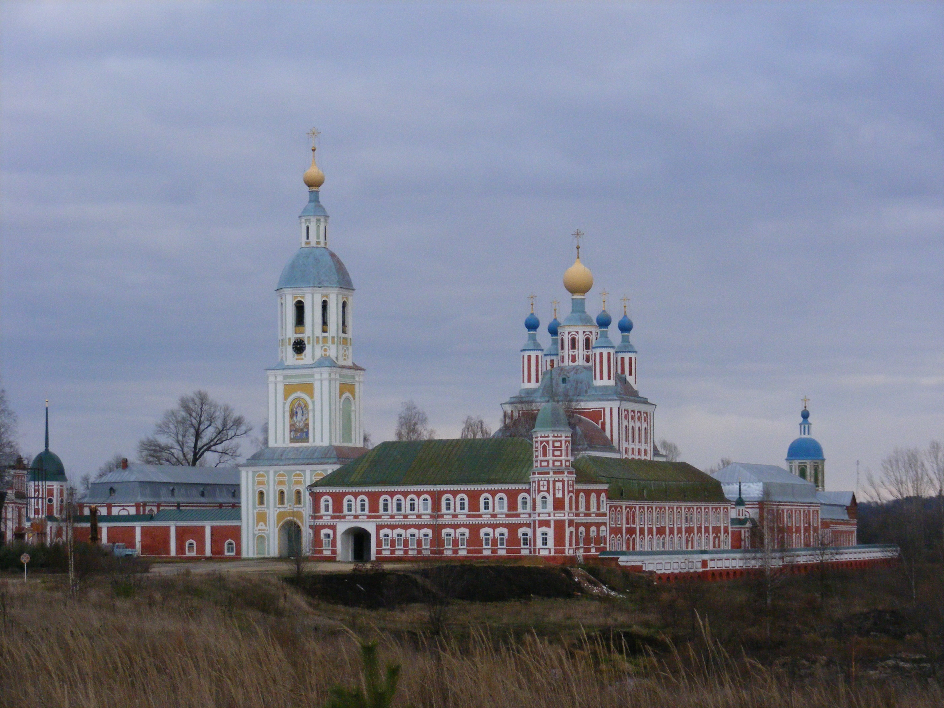 Рождество-Богородичный Санаксарский мужской монастырь. Темниковский район Республики Мордовия.